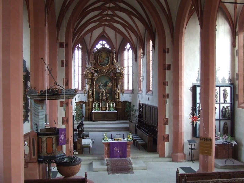 Simultankirche in Bechtolsheim im Hintergrund der Petersberg